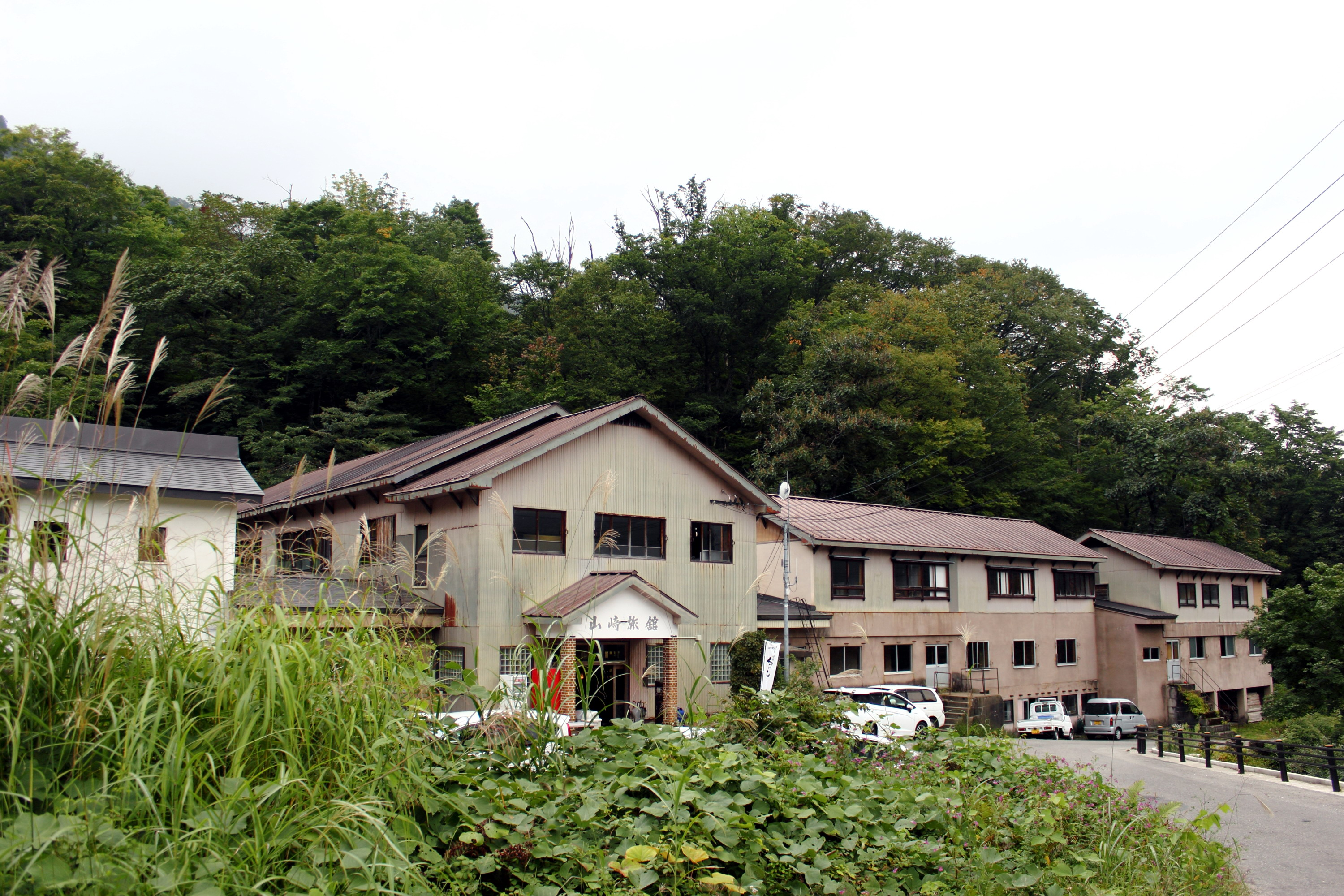 新岩間温泉 山崎旅館(2015.09.21)